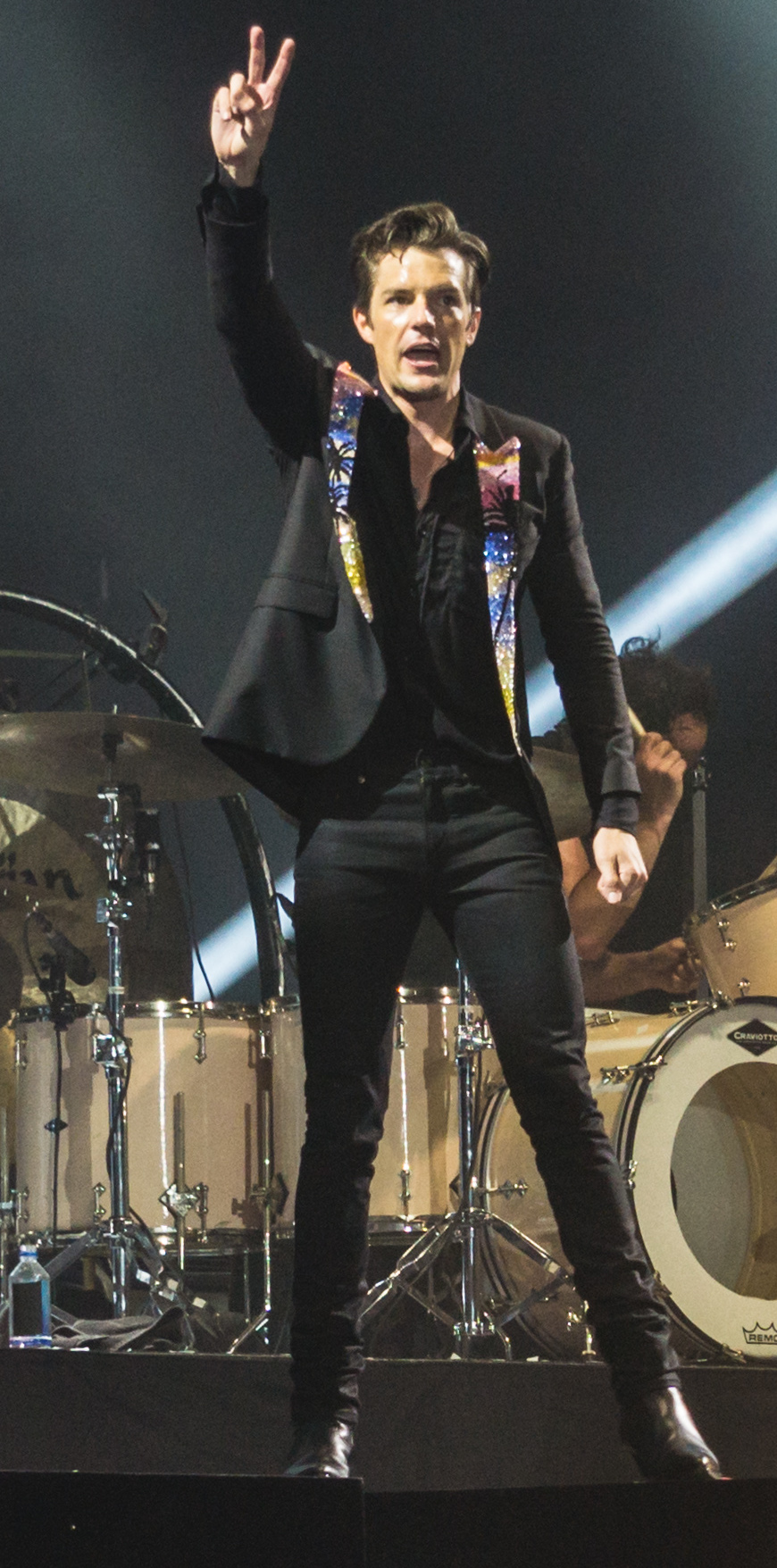 KillersBST080717-65